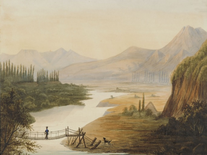 Pedro José Amado Pissis